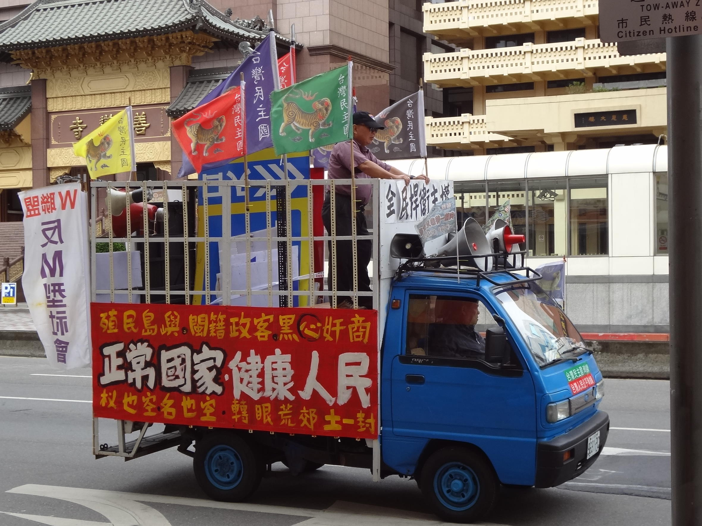 臺北市中正區忠孝東路一段善導寺前，台灣民主國陣線與台灣人民公平陣線的福特好幫手宣傳車9691-PC，車頂插「向陸一特弟兄致敬」小旗子。